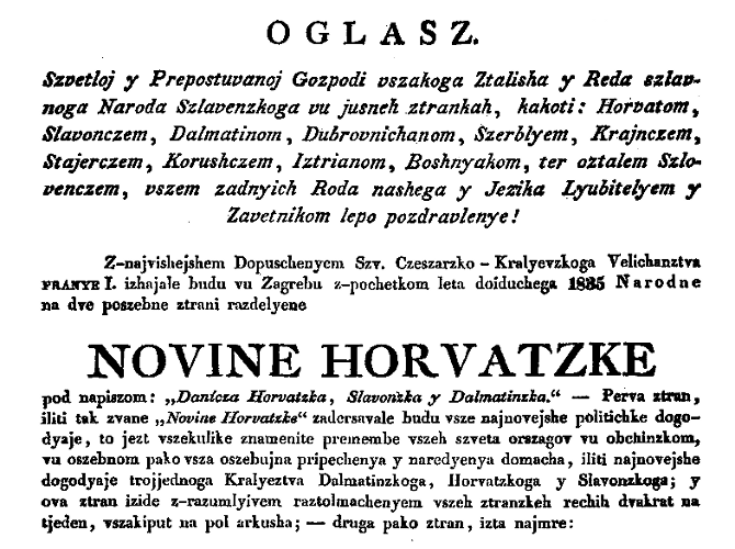 Oglas kojim se poziva na pretplatu na Novine Horvatzke izdavača Ljudevita Gaja.